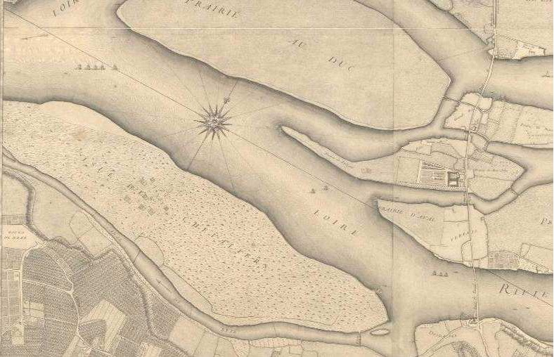 Carte des rives de la Loire et de ses nombreuses îles au XVIIIe siècle.